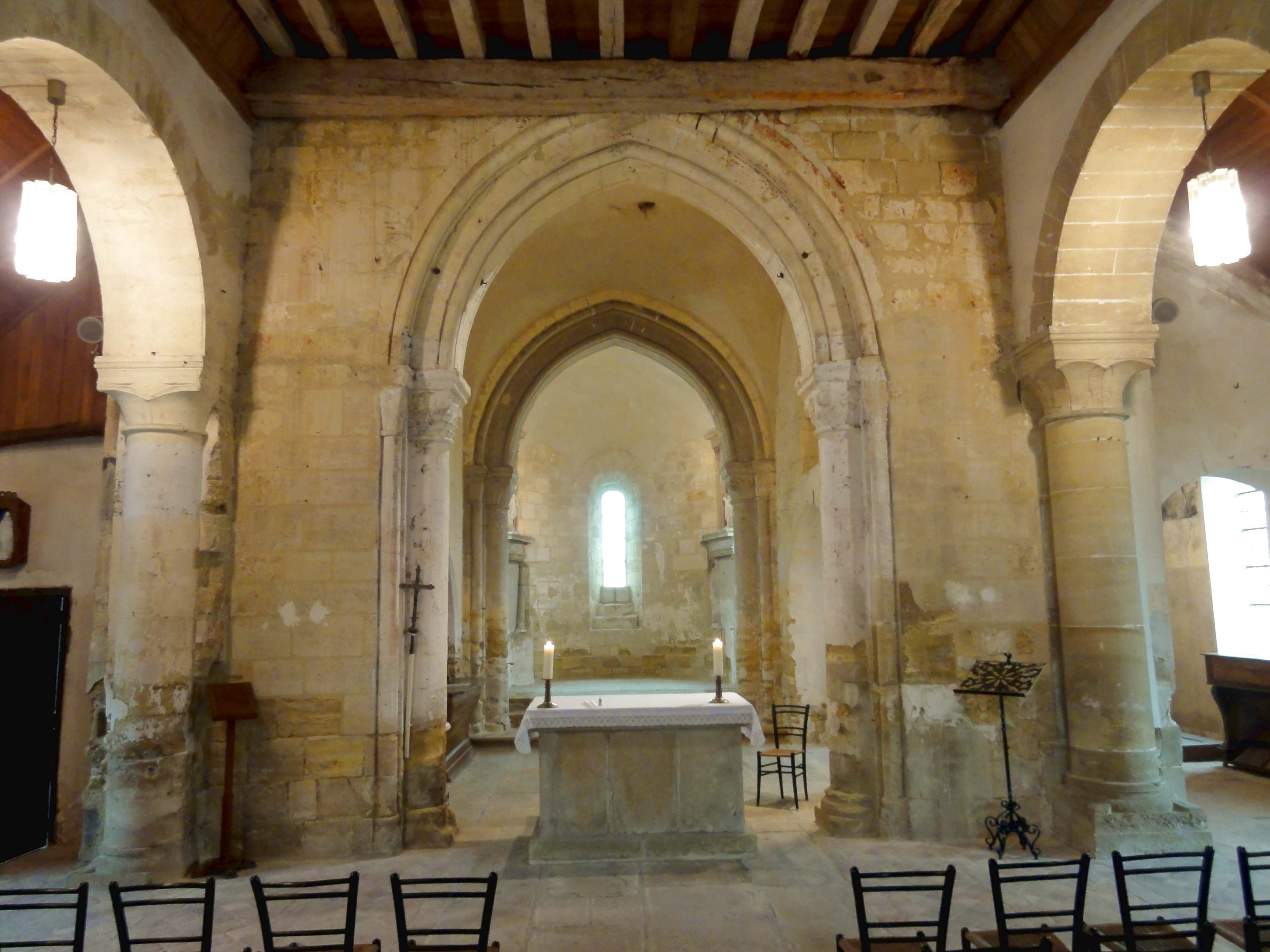 Intérieur de l'église - voir titre.